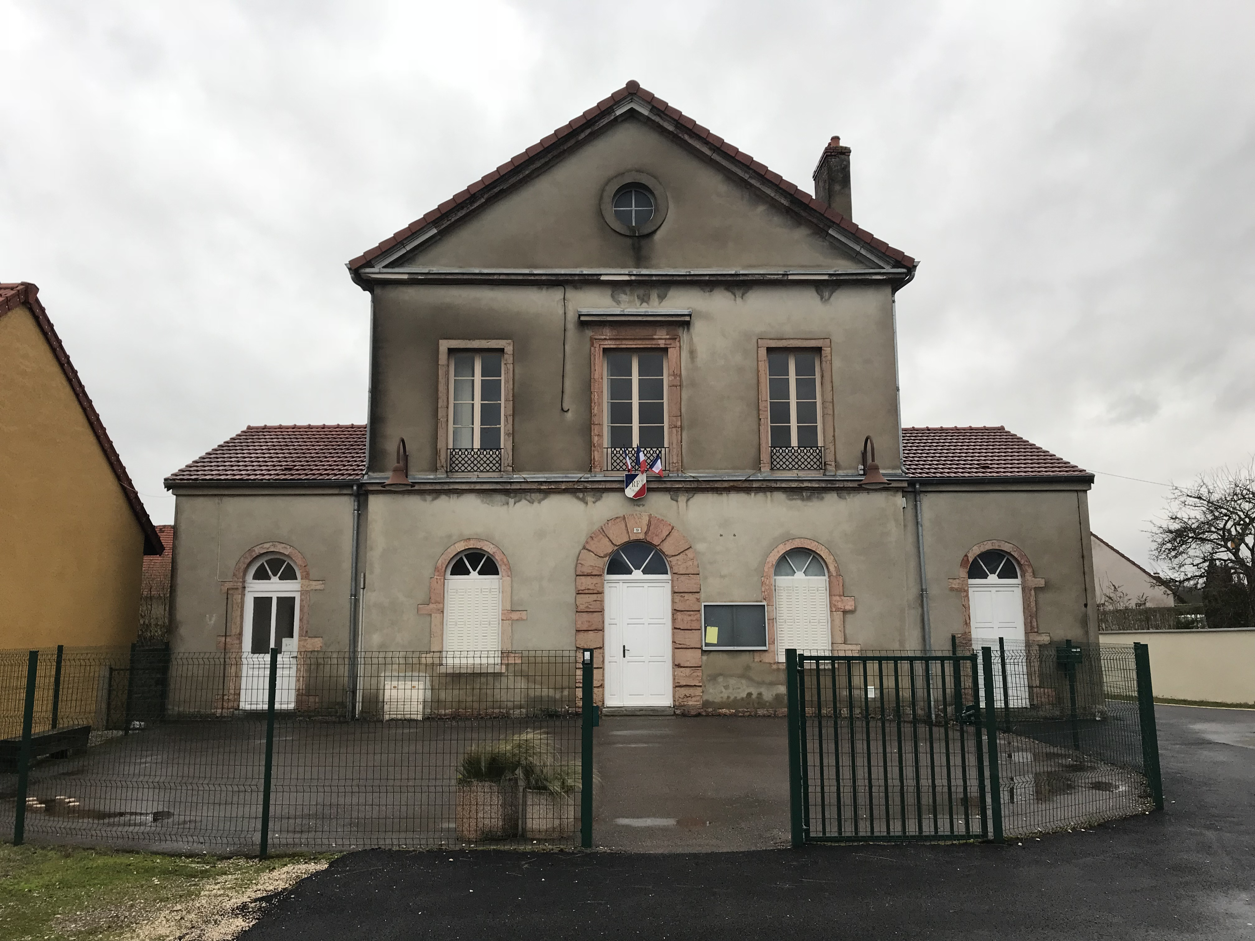 Billey (Côte-d'Or) en janvier 2018.